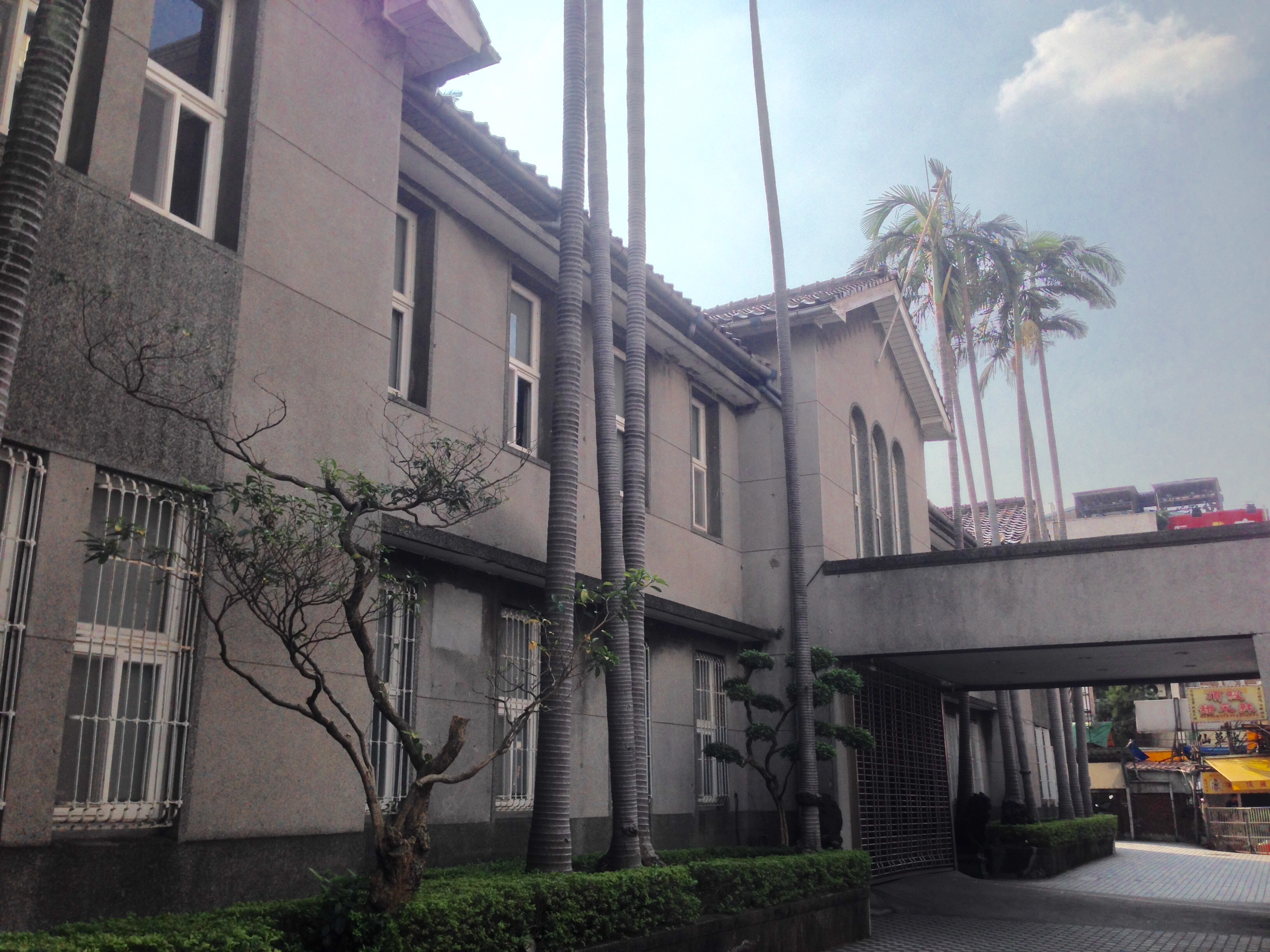 臺北仁濟院